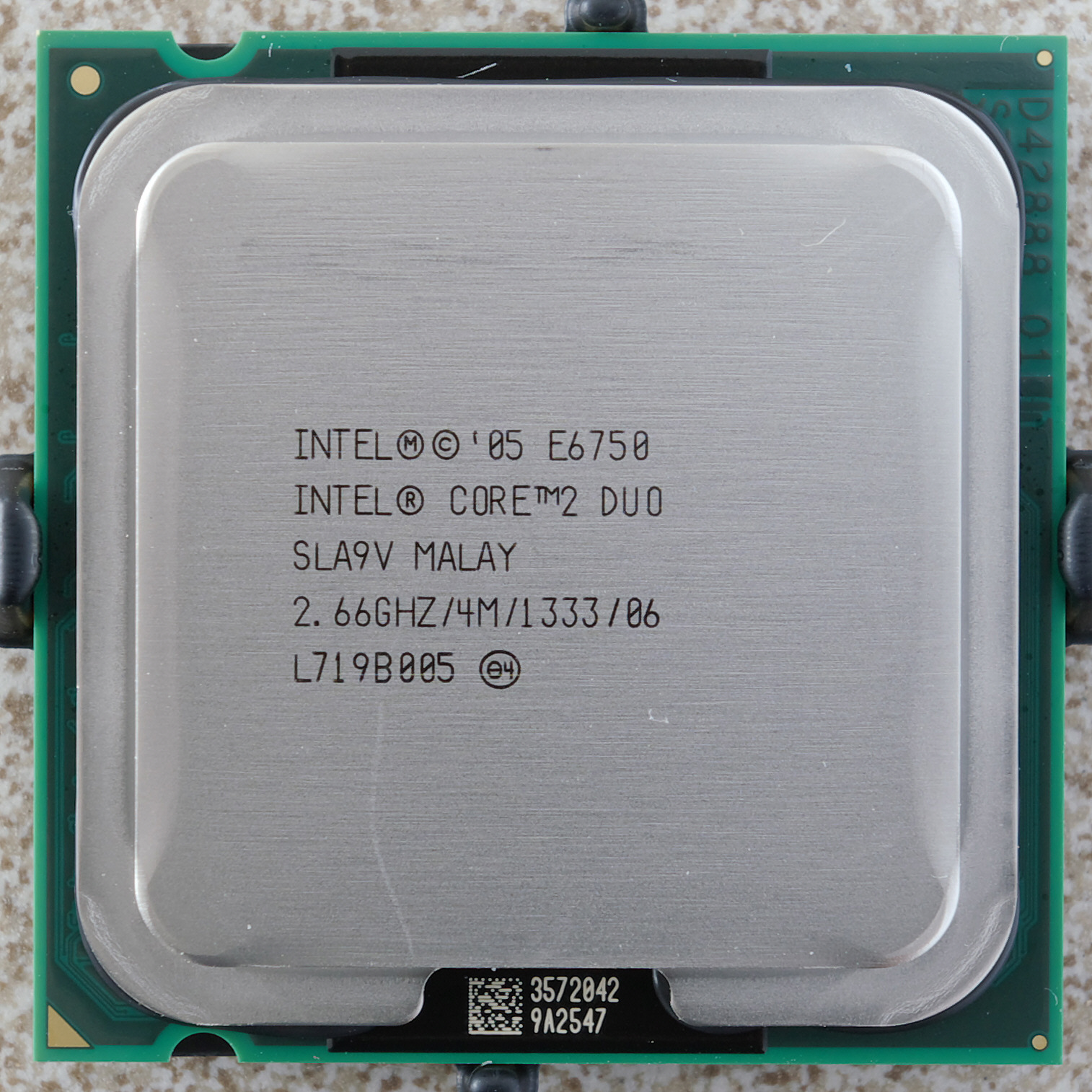 Intel core2 duo 6750 LGA775